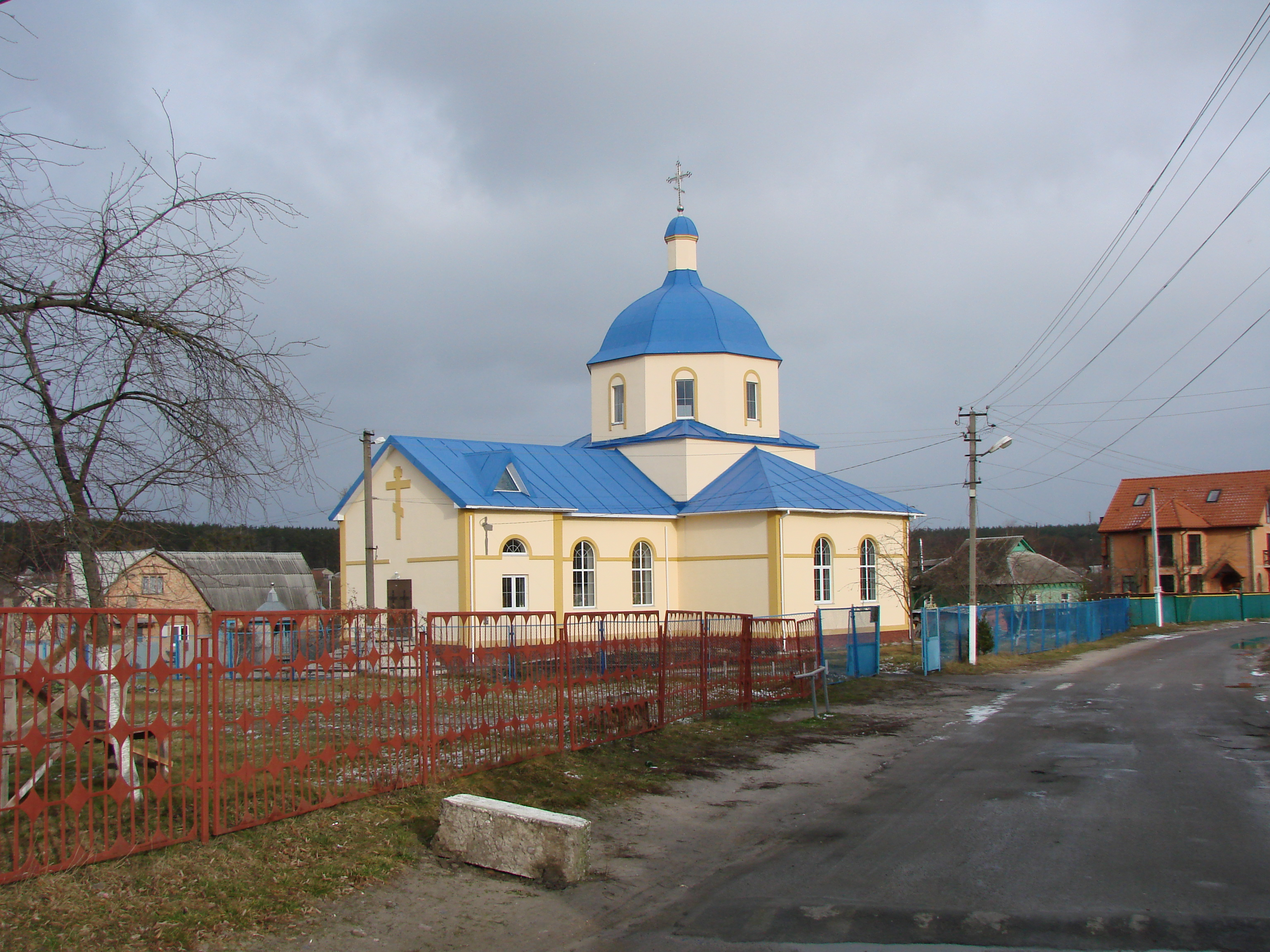 Миколаївська церква (дер.), село Мала Солтанівка